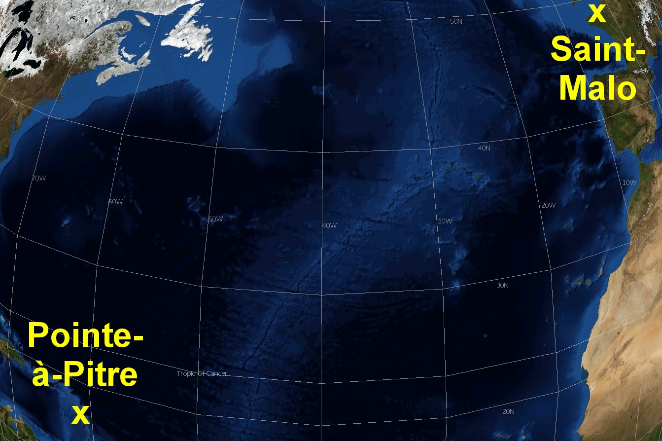 Ausgangshafen (Saint-Malo) und Zielhafen (Pointe-à-Pitre) der Route du Rhum